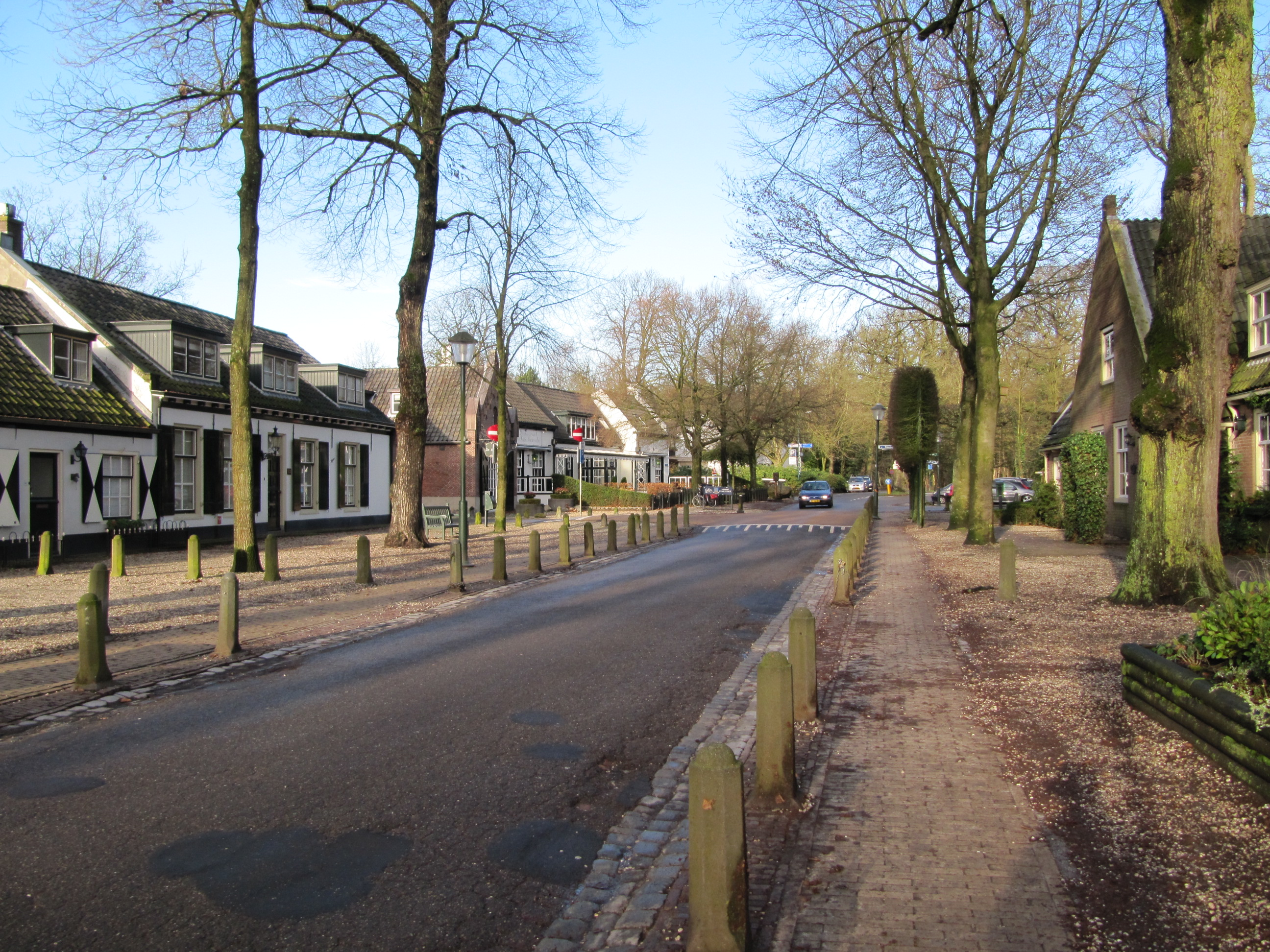 Lage Vuursche, Dorpsstraat. Linksaf, bij de verkeersdrempels, de Eikenlaan. Daar voorbij (witgepleisterd) De Lage Vuursche, rijksmonument nr. 8551